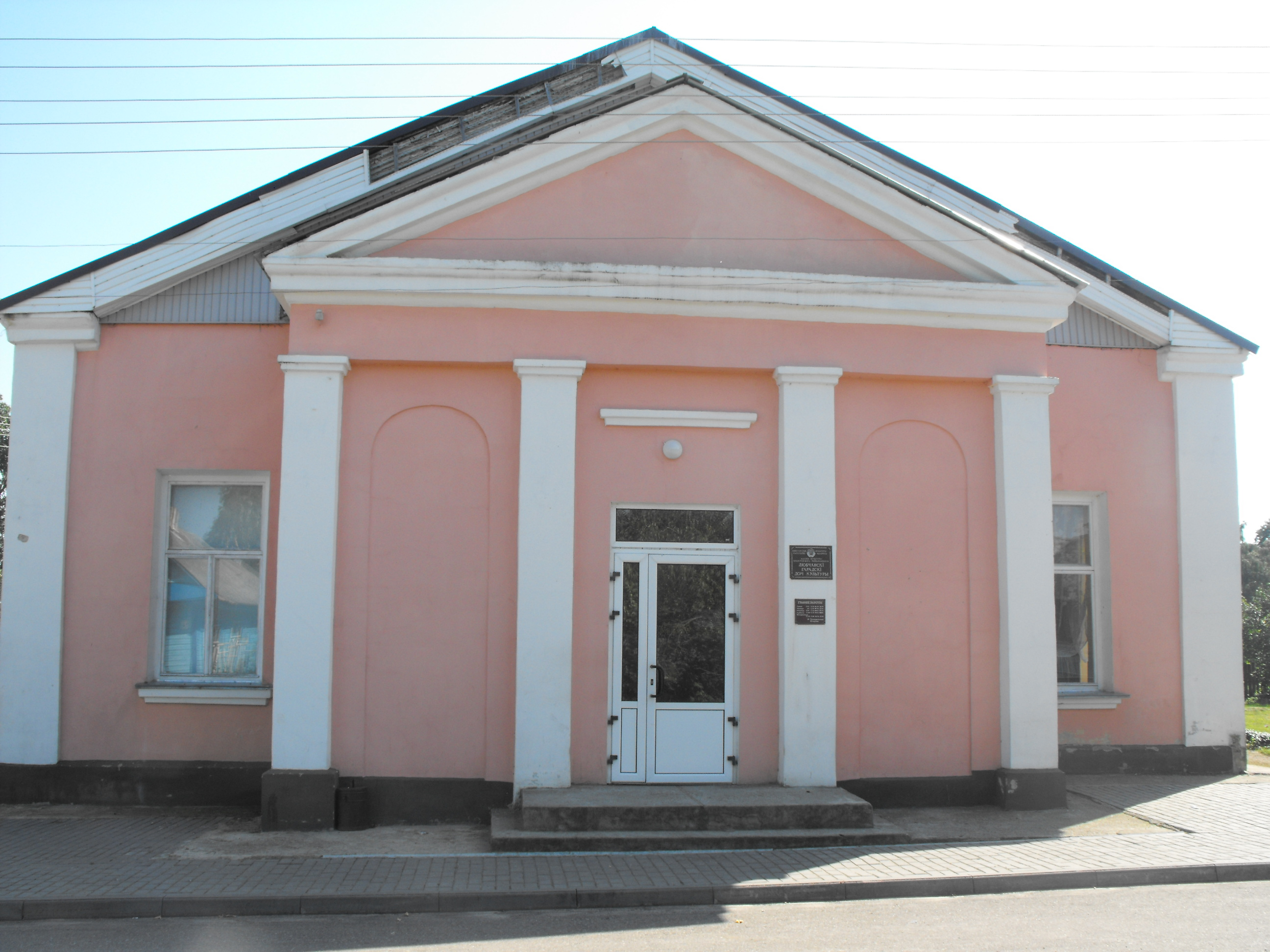 Здание бывшей синагоги, ныне - дом культуры